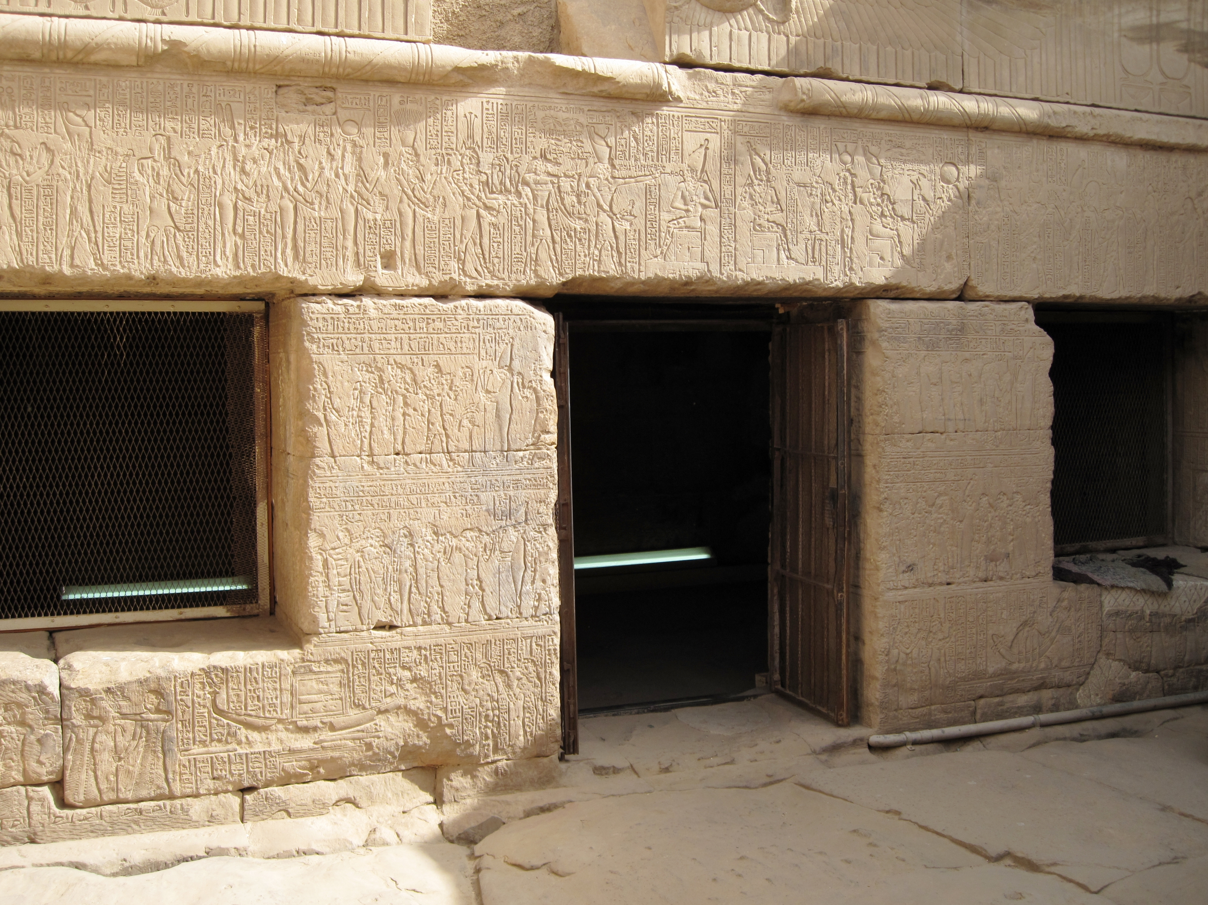 Dachgeschoss des Tempels von Dendera, Ägypten